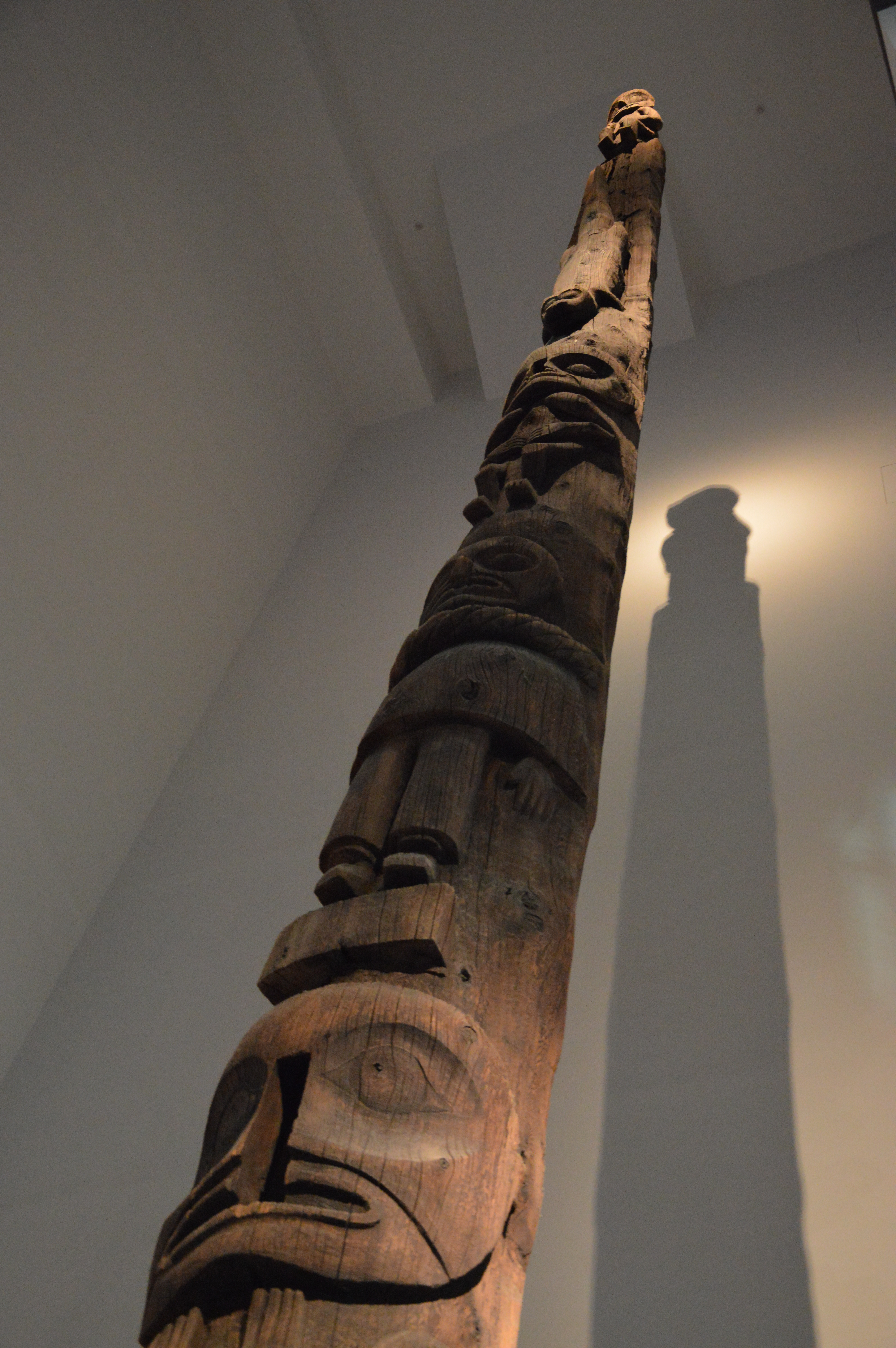 Mât totem "Kaiget". Population wet'suwet'en. Colombie britannique. Vers 1860. Dimensions : 1451 x 75 x 60 cm. Cèdre rouge thuya plicata, traces de peinture. Inv : 71.1992.55.1